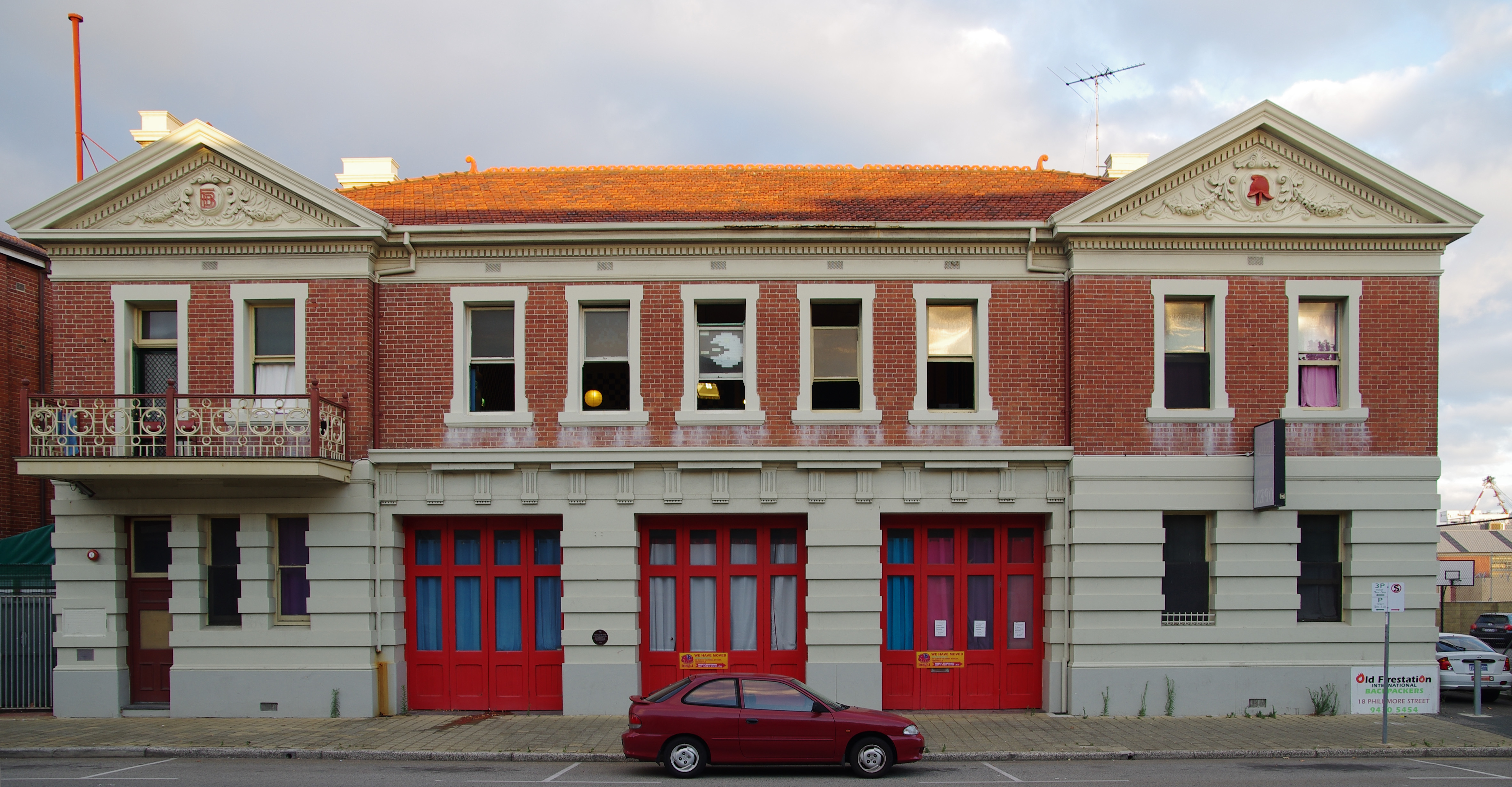 Fremantle Firestation